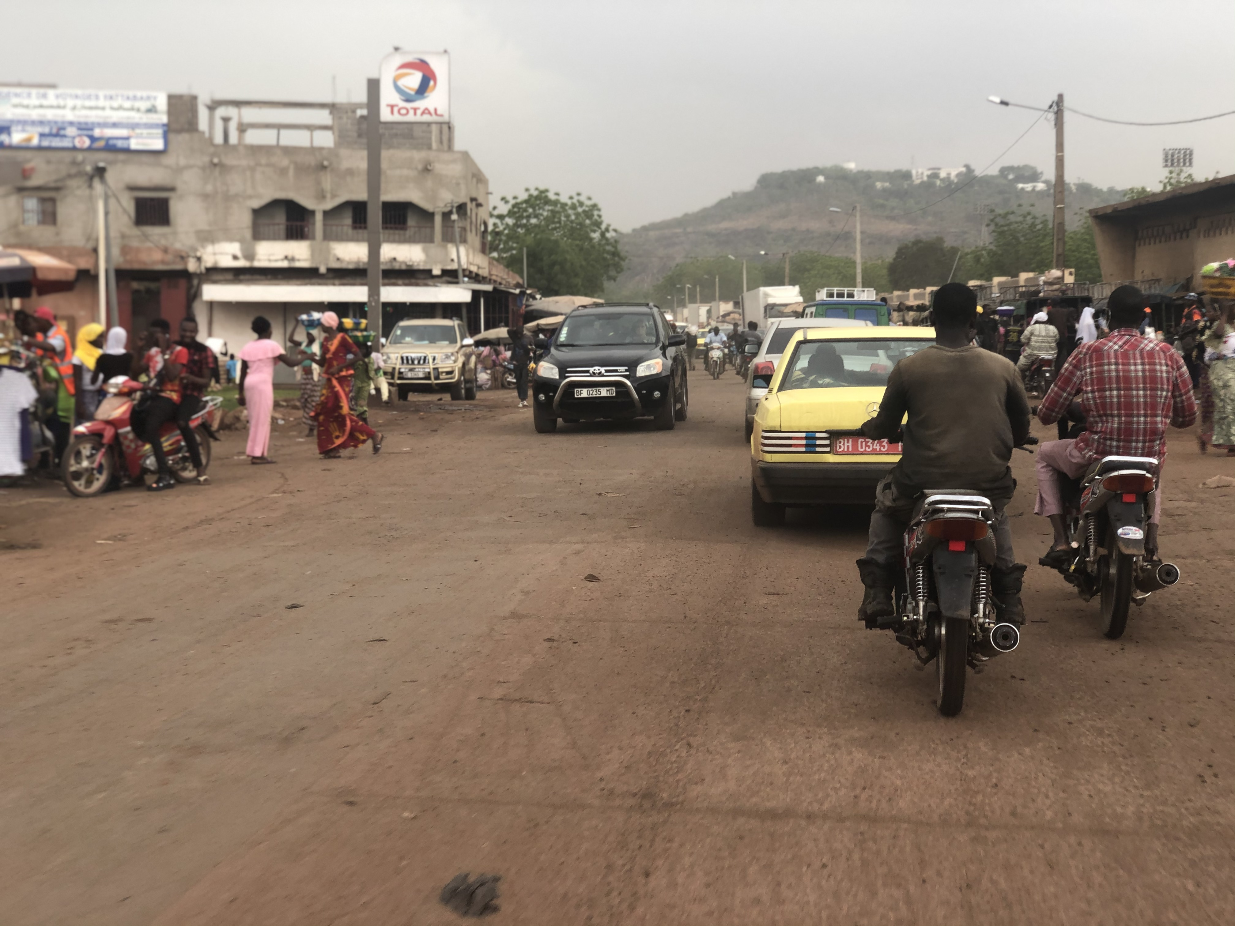 Concours wiki loves Africa 2020 This is an image with the theme "Africa on the Move or Transport" from: Mali